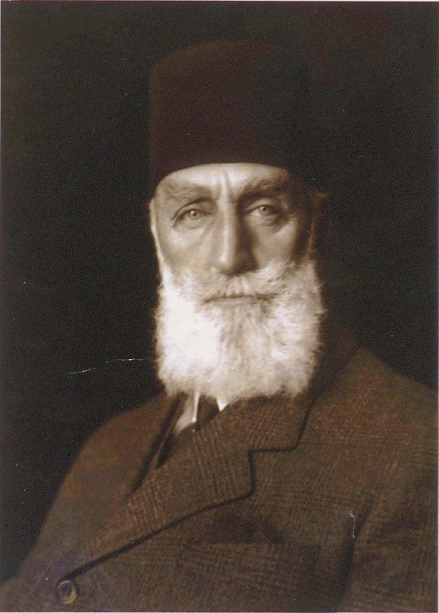 Halife Abdülmecid Efendi